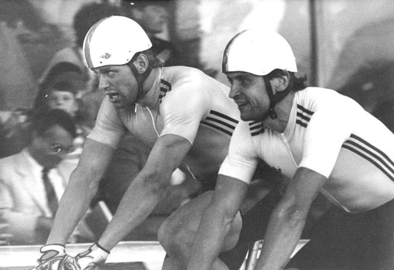 Michael Hübner, Lutz Heßlich ADN-ZB Gahlbeck 19.8.85 Leipzig: Vorbereitung Weltmeisterschaften im Bahnradsport vom 22. bis 27.8.1985 in Bassano del Grappa-Italien - Zu den heißen Anwärtern auf den Sprinttitel gehören die DDR-Fahrer Michael Hübner (SC Karl-Marx-Stadt-l.), Lutz Heßlich (SC Cottbus-r.) und Ralf Kuschy (TSC Berlin - sieh Motiv 1985-0819-29N). Mit elf Saisonsiegen ist Lutz Heßlich noch ungeschlagen und strebt nach 1979 und 1983 sein drittes Regenbogentrikot an. Foto vom Großen preis der DDR 1985 in Leipzig.